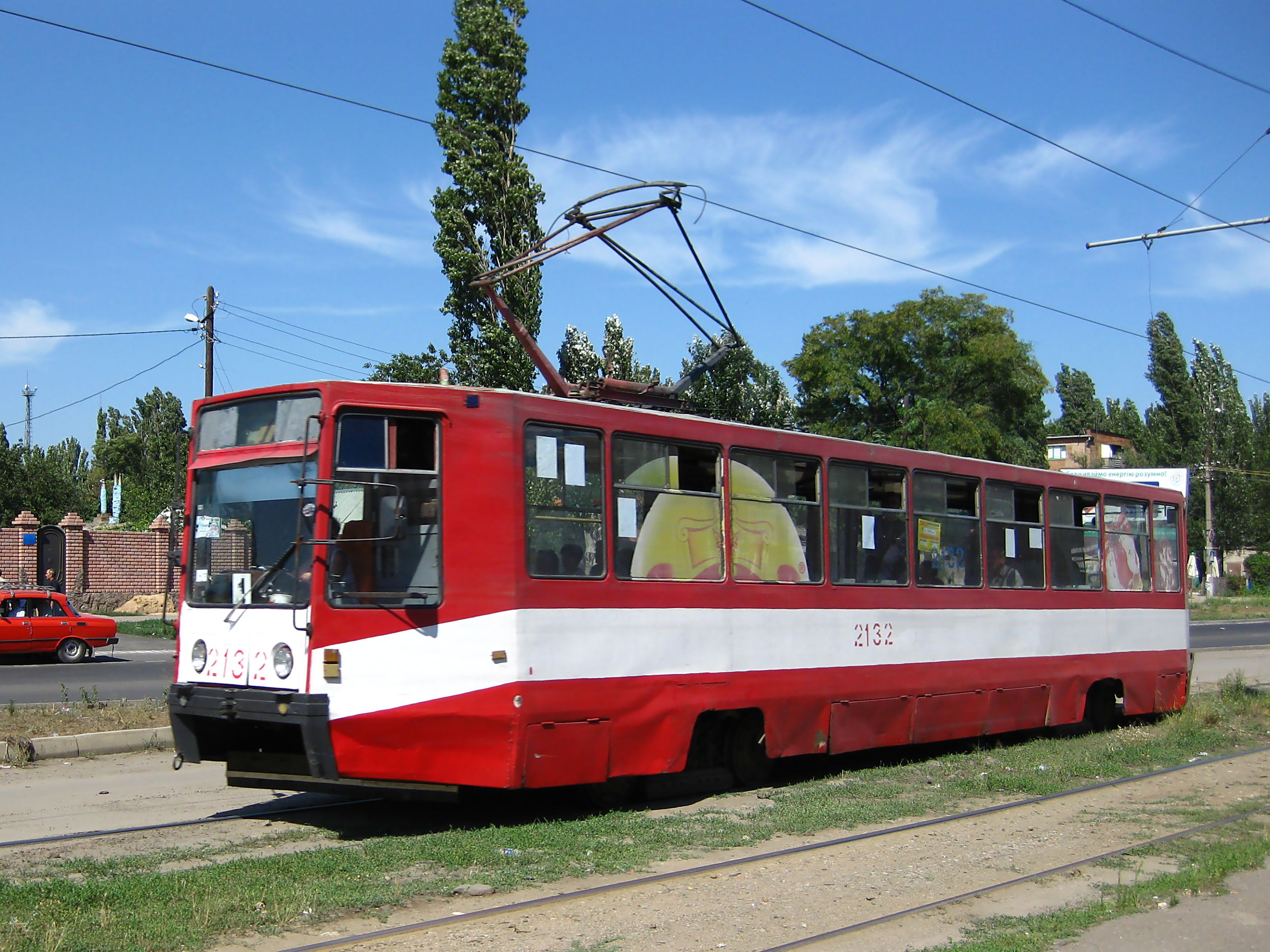 Вагон 71-608К В Николаеве (Украина)